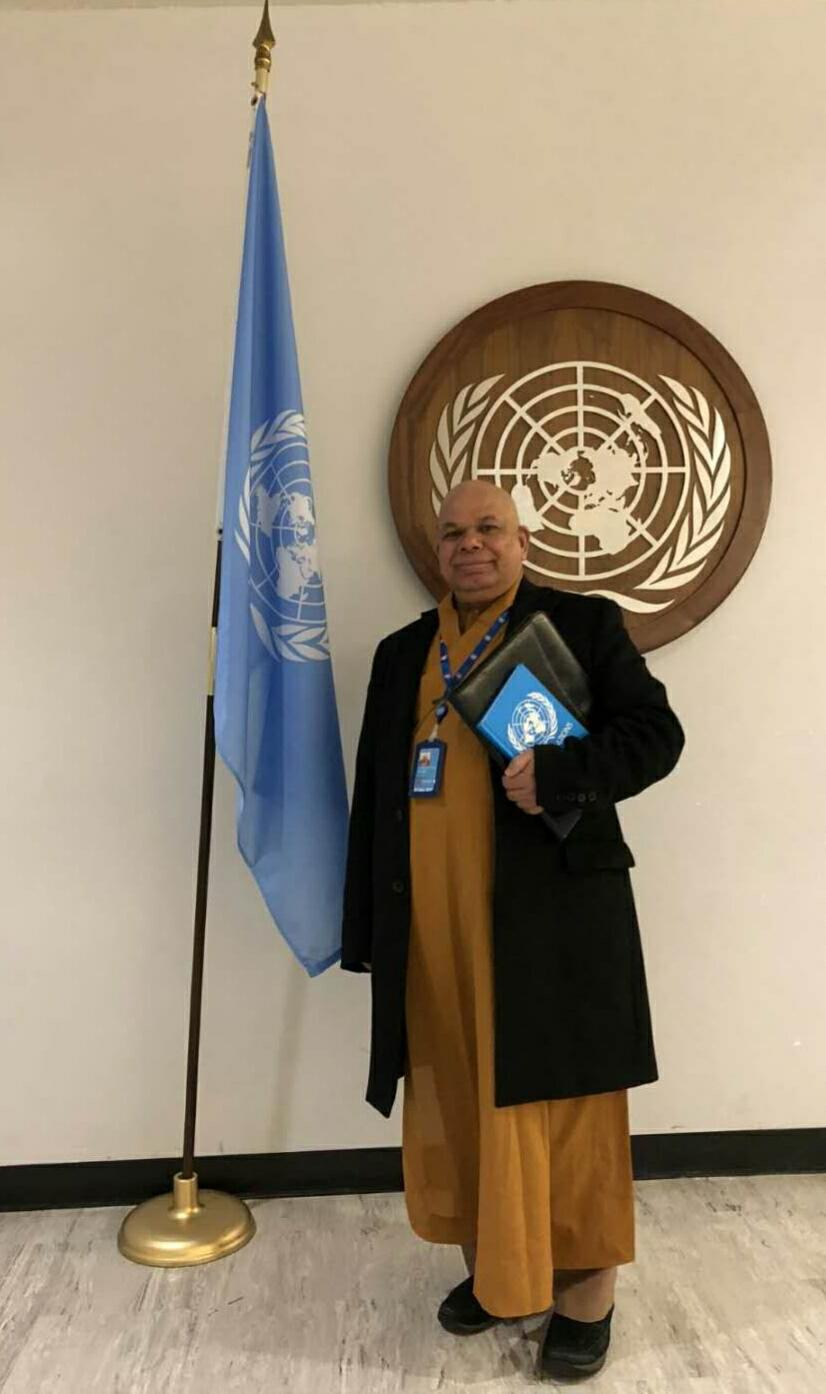 Vénérable Dhammaratana à l'ONU